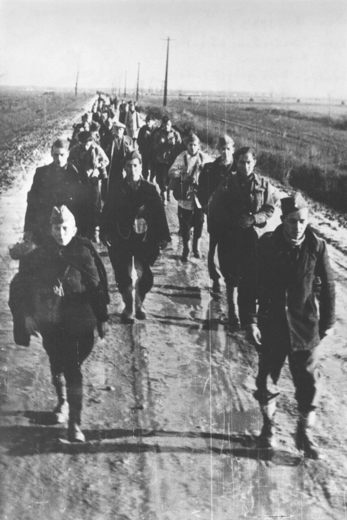 Borci slovenskega 5.bataljona 1.krajiške brigade na poti v Sremsko Mitrovico. Na sliki so: Slavko Peletov, Ivo Mihev, Milan Peroci, Marjan Wolf....